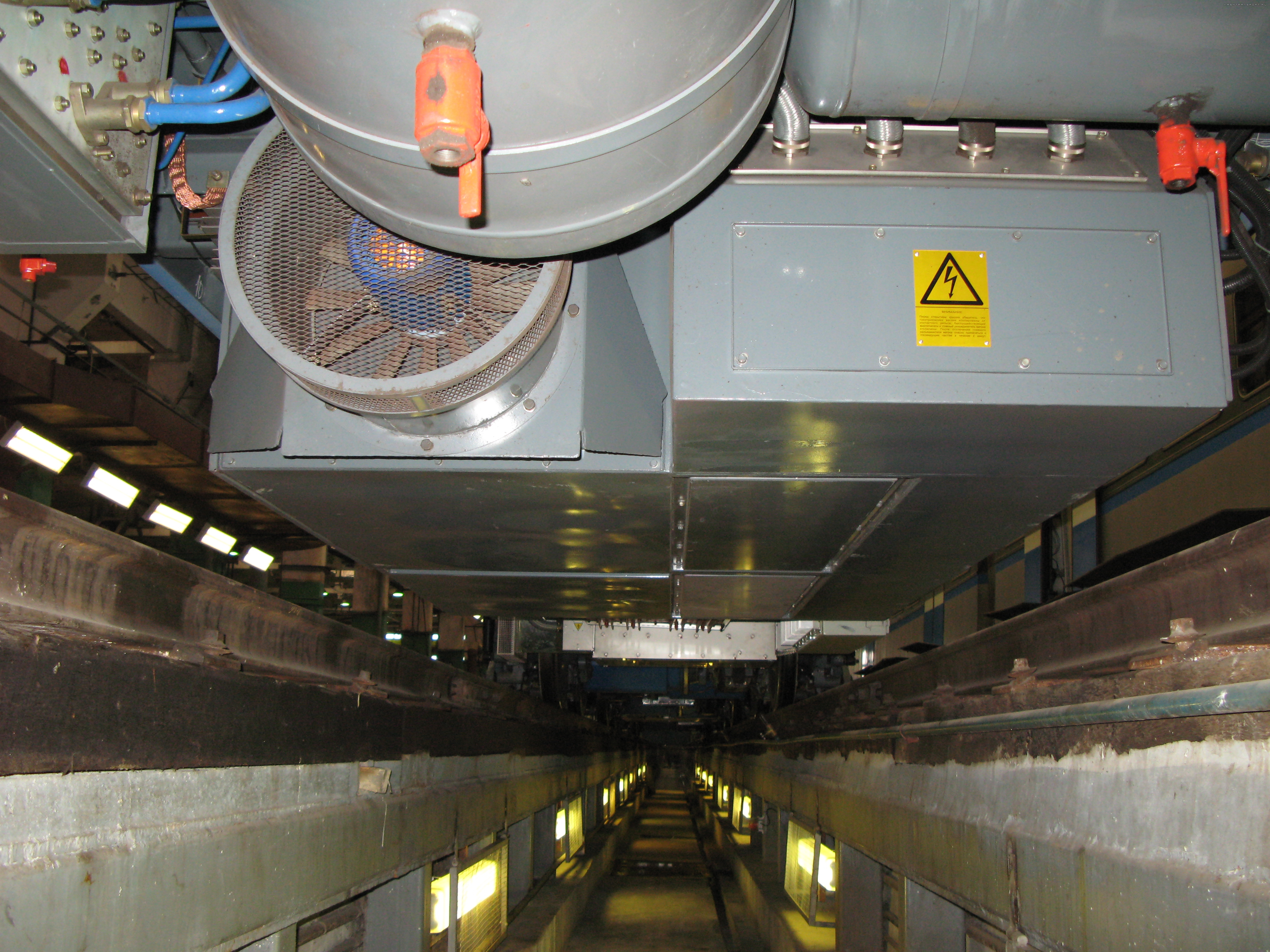 Тяговый инвертор в подвагонном пространстве электропоезда метро 81-760-761